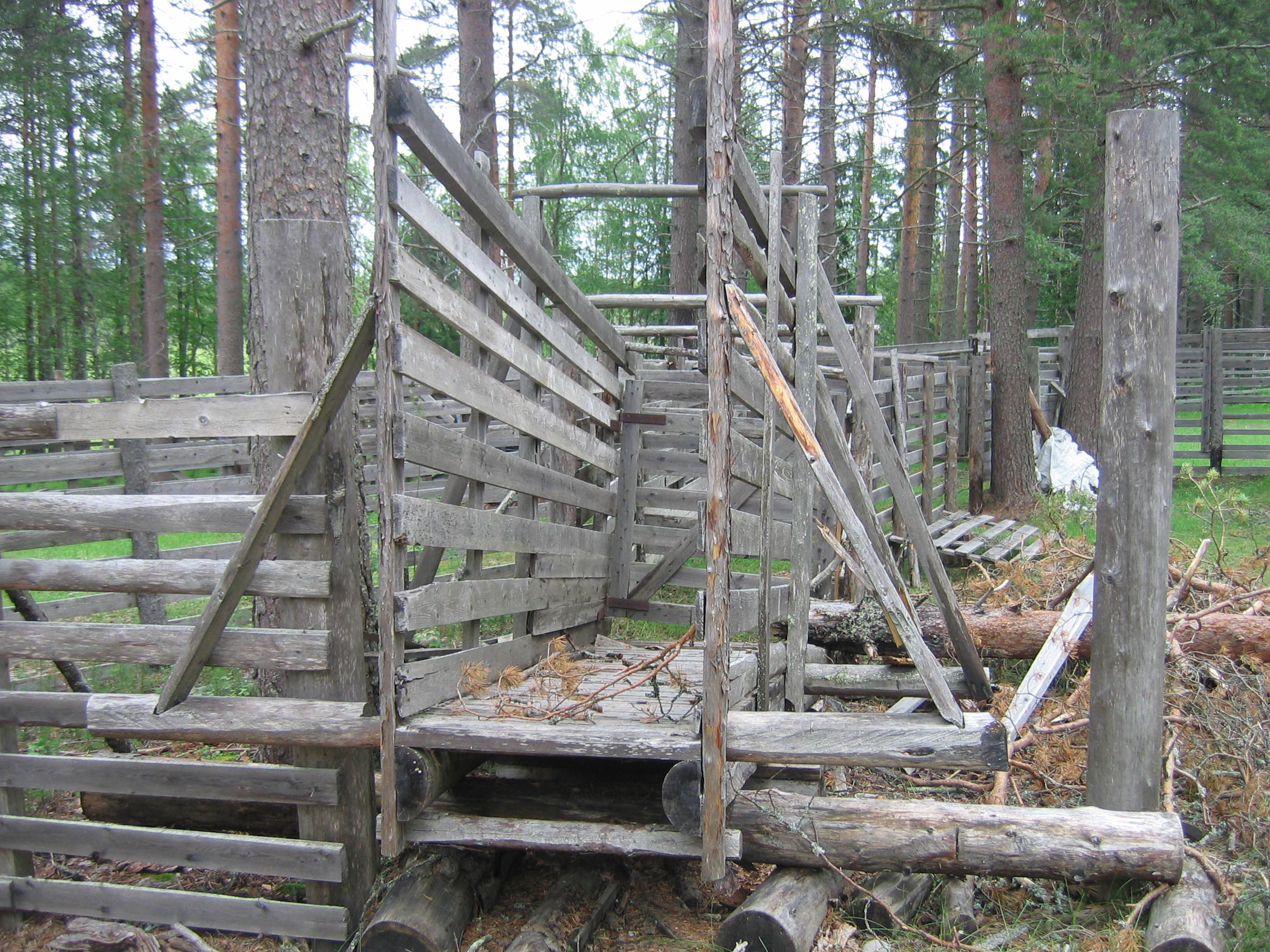 Reindeer gathering fences in Kälväsvaara's reindeer gathering area in Marttisjärvi (Juorkuna), Utajärvi, Finland.